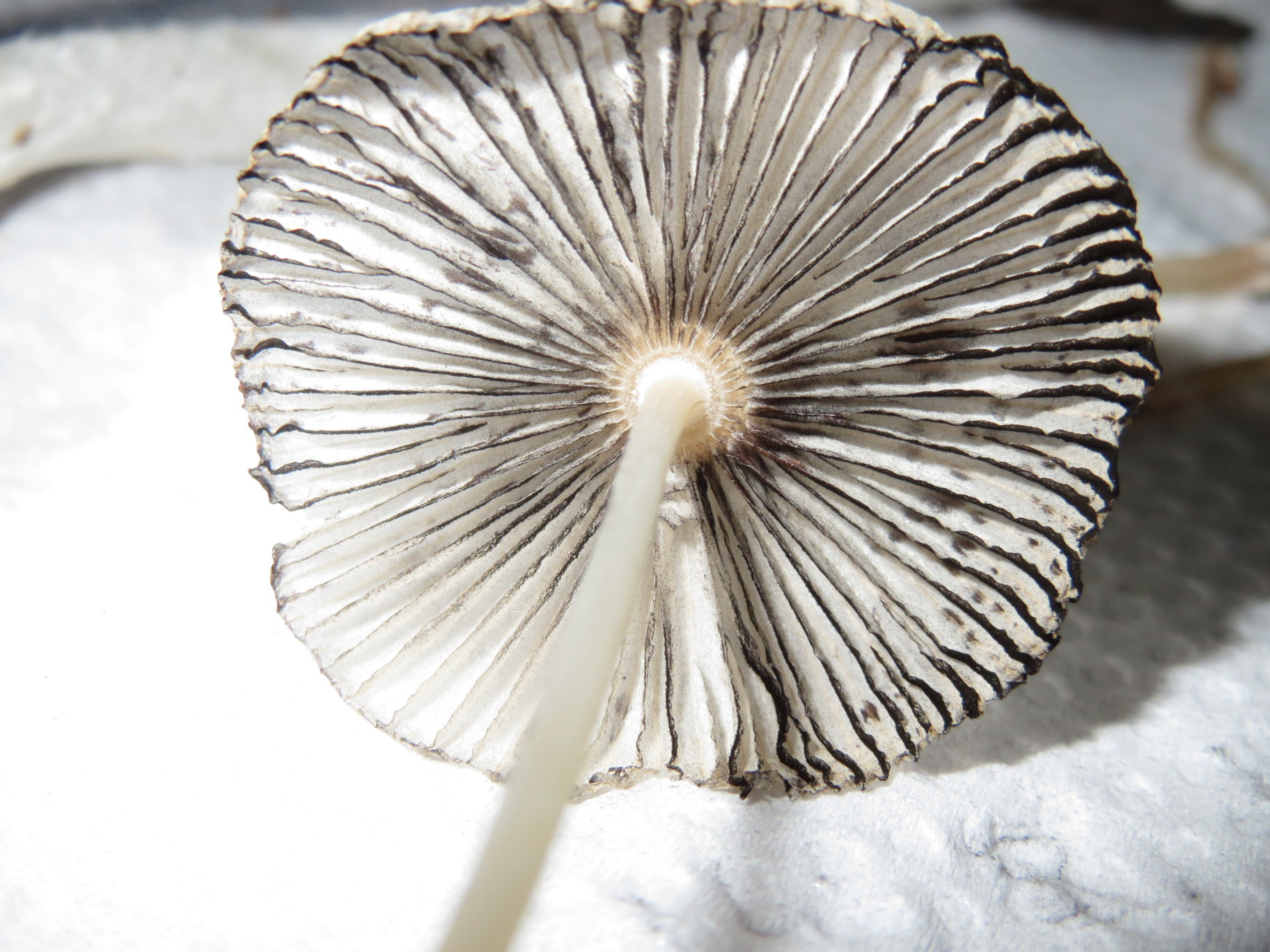 Ratasmustesienen heltat